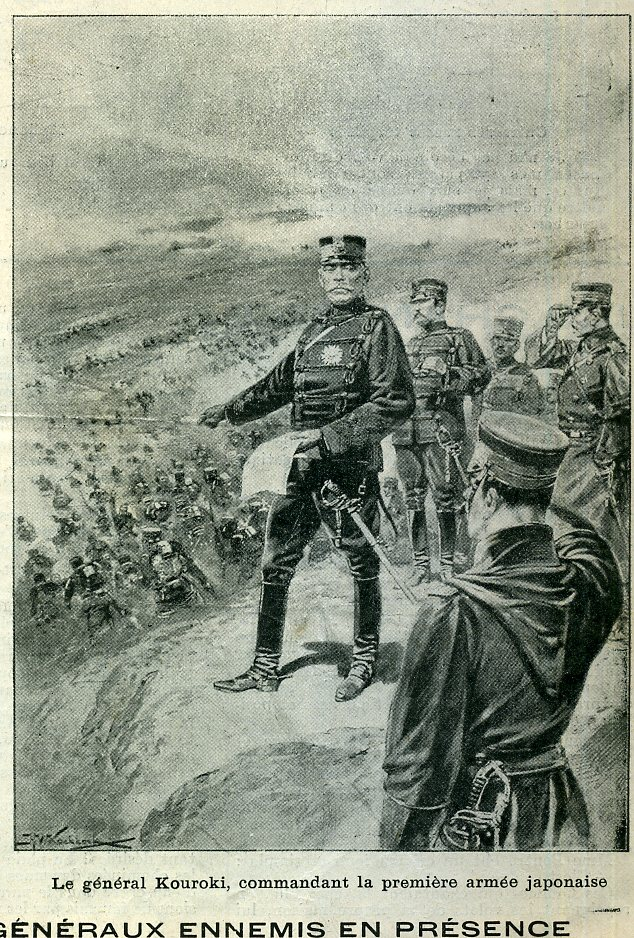 see picture